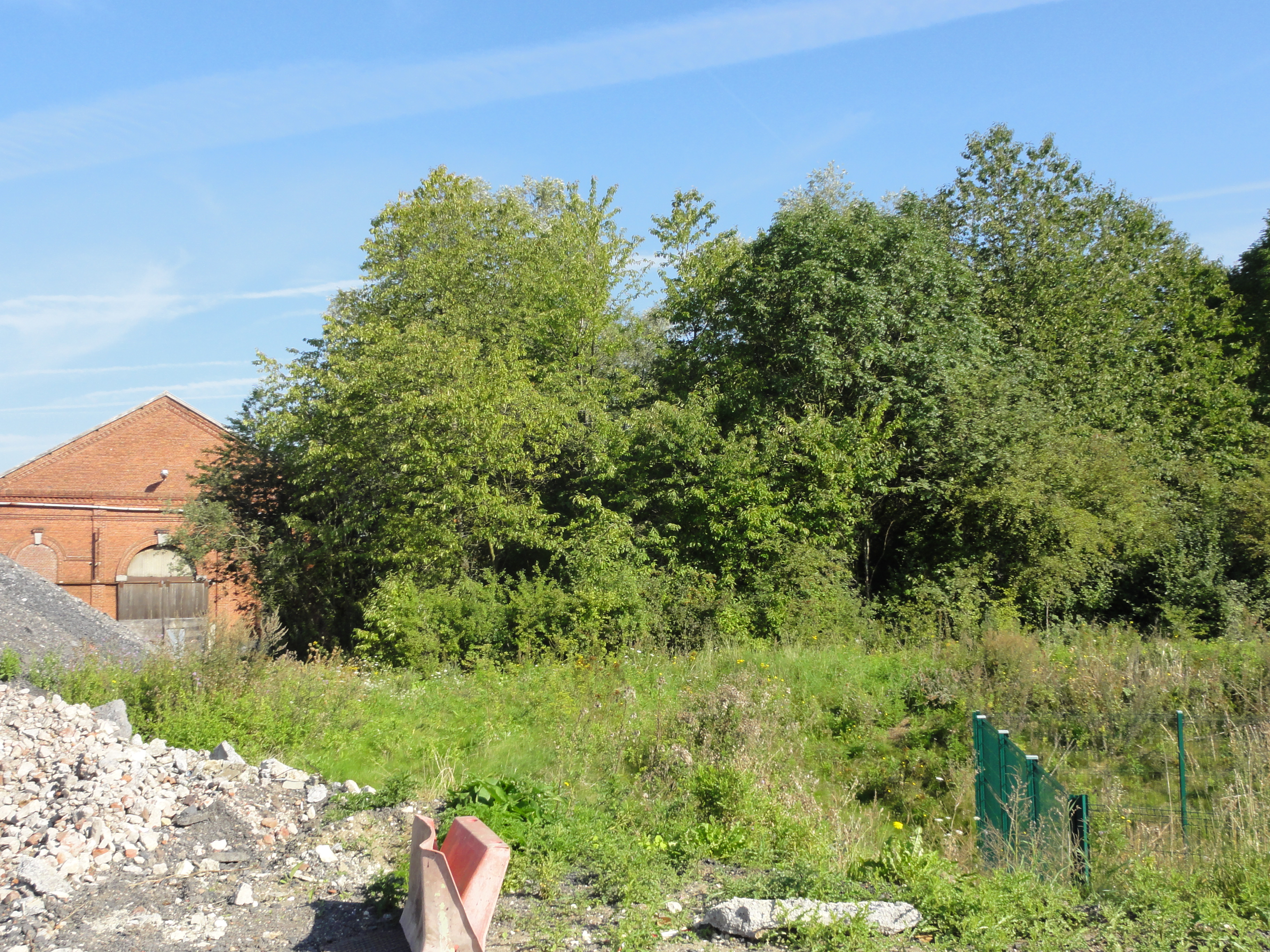 Terril n° 168 dit Boca, disparu, Fosse Boca de la Compagnie des mines de Douchy, Douchy-les-Mines, Nord, Nord-Pas-de-Calais, France.